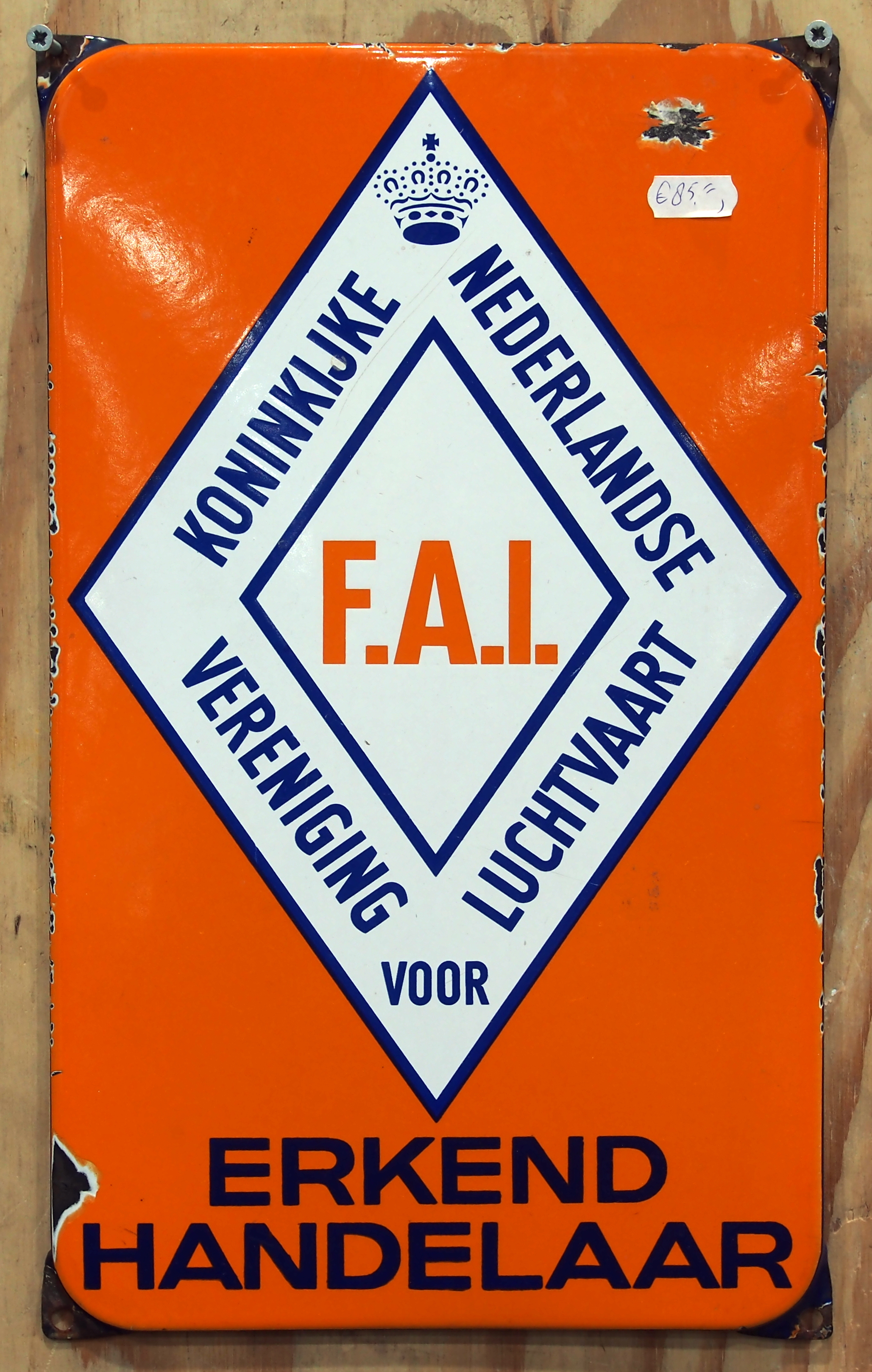 Enamel advertising signs photographed at the Verzamelaarsjaarbeurs, Utrecht.